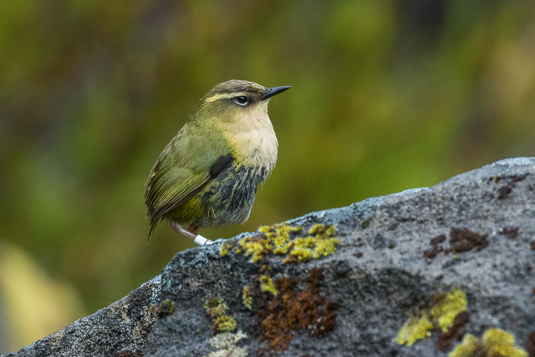 Rock Wren - Te Anau - New Zealand_FJ0A6147